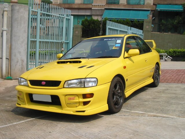 スバル・インプレッサ